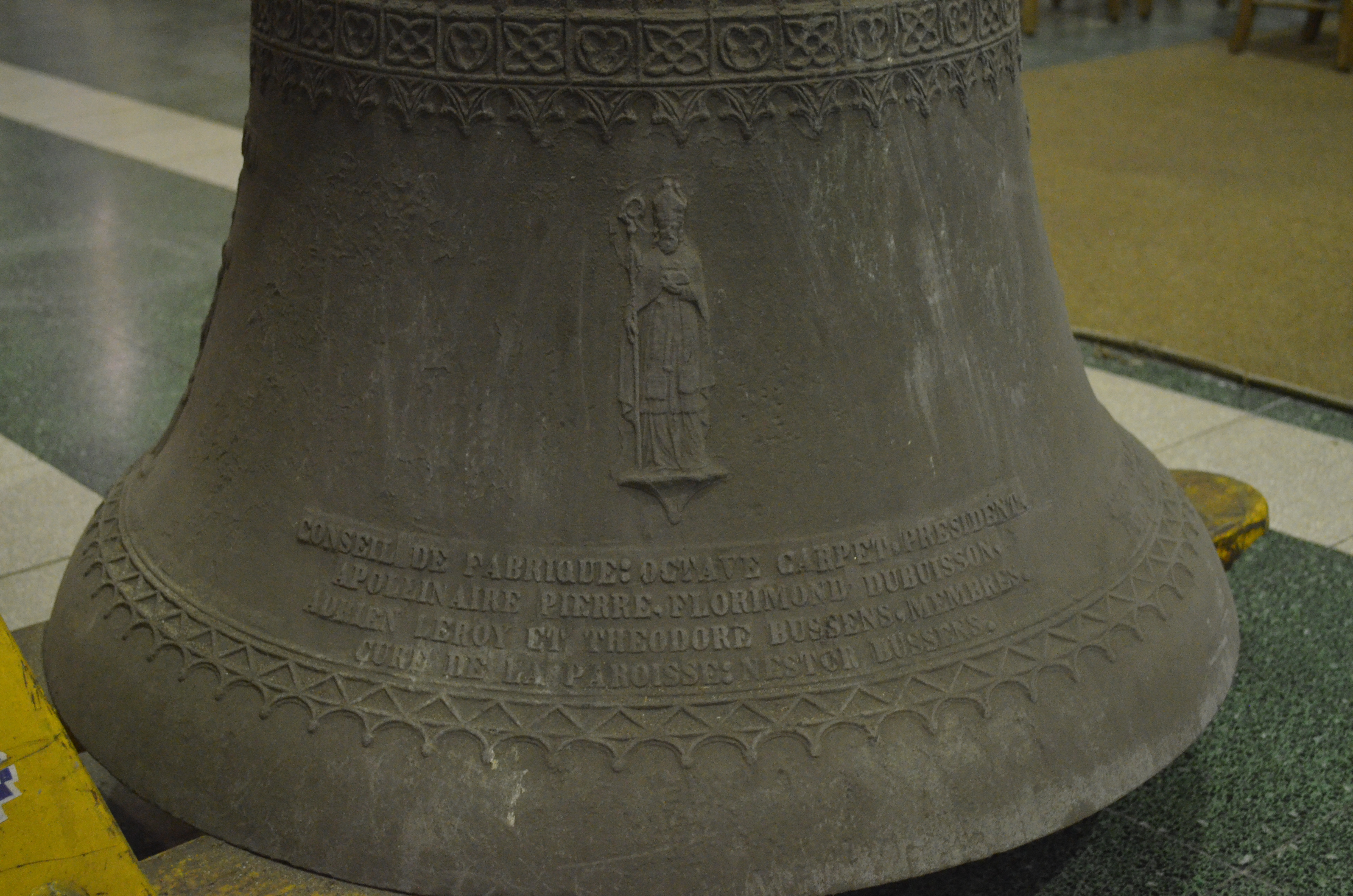 Charleroi - Église Saint-Joseph (la Broucheterre) - Samedi 25 novembre 2017, descente de la cloche installée en 1897.